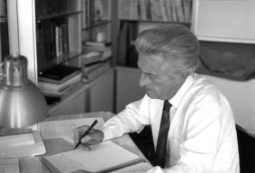 René Ballet à son deuxième poste de travail